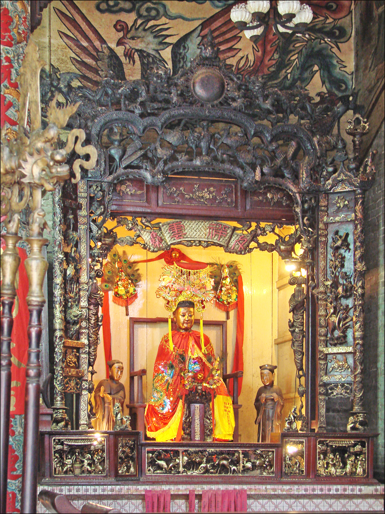 Sur l'autel, la Déesse Thiên Hâu est entourée de deux gardiens Thiên Hậu (appelée aussi Mazu) est une divinité traditionnelle chinoise, vénérée dans les provinces maritimes du sud de la Chine (Canton,..) et dans les communautés chinoises expatriées, comme ici à Hô Chi Minh-vville, l'ancienne Saïgon. (extrait de l'article Wikipedia). On trouve des temples semblables à Hoi An (Vietnam). voir aussi : C'est une Déesse-mère (Dame de la mer, Dame céleste,..), protectrice des marins mais elle est également priée par les femmes en particulier pour avoir des enfants. Les prières qui lui sont faites peuvent être inscrites sur des papiers rouges qui sont brulés dans un poële dans la cour du temple pour que la fumée emporte les requêtes jusqu'à elle. Les offrandes à la Déesse sont de divers types : bâtons et spirales d'encens, fruits, argent,. Selon les croyances populaires, des âmes errantes se trouvent aussi dans le temple, ce sont celles des morts qui ne reçoivent pas de culte ou celles de damnés, ces âmes peuvent être dangereuses pour les vivants, il faut donc tenter de les satisfaire, en leur faisant des offrandes et en leur rendant un culte particulier. Le temple taoïste Thien Hâu a été construit au début du XIXe siècle (1827), il est situé au coeur du quartier chinois de Cholon, près du marché de gros.